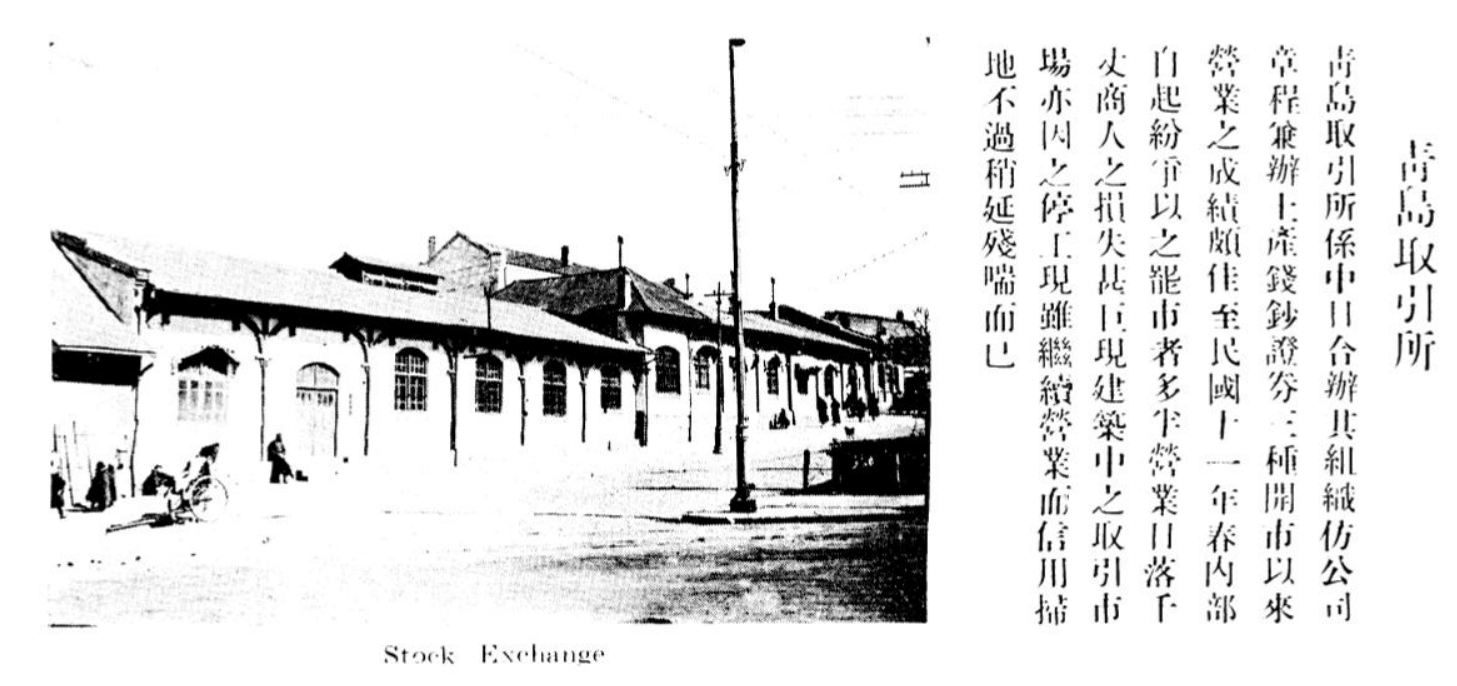 青岛取引所1920年代初